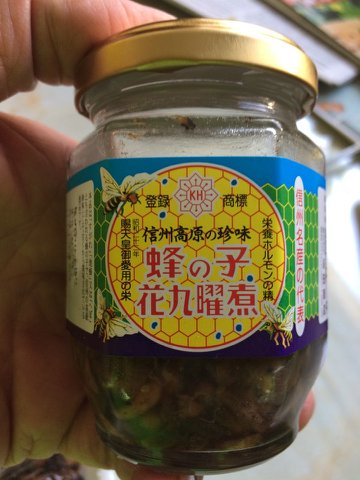 Embalaža vloženih sladkokislih os, hachinioko